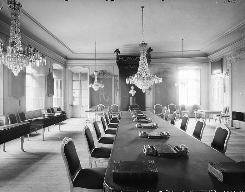 Bondeska palatset, Gamla rådhuset, Riddarhustorget 8. Magistratens sessionssal